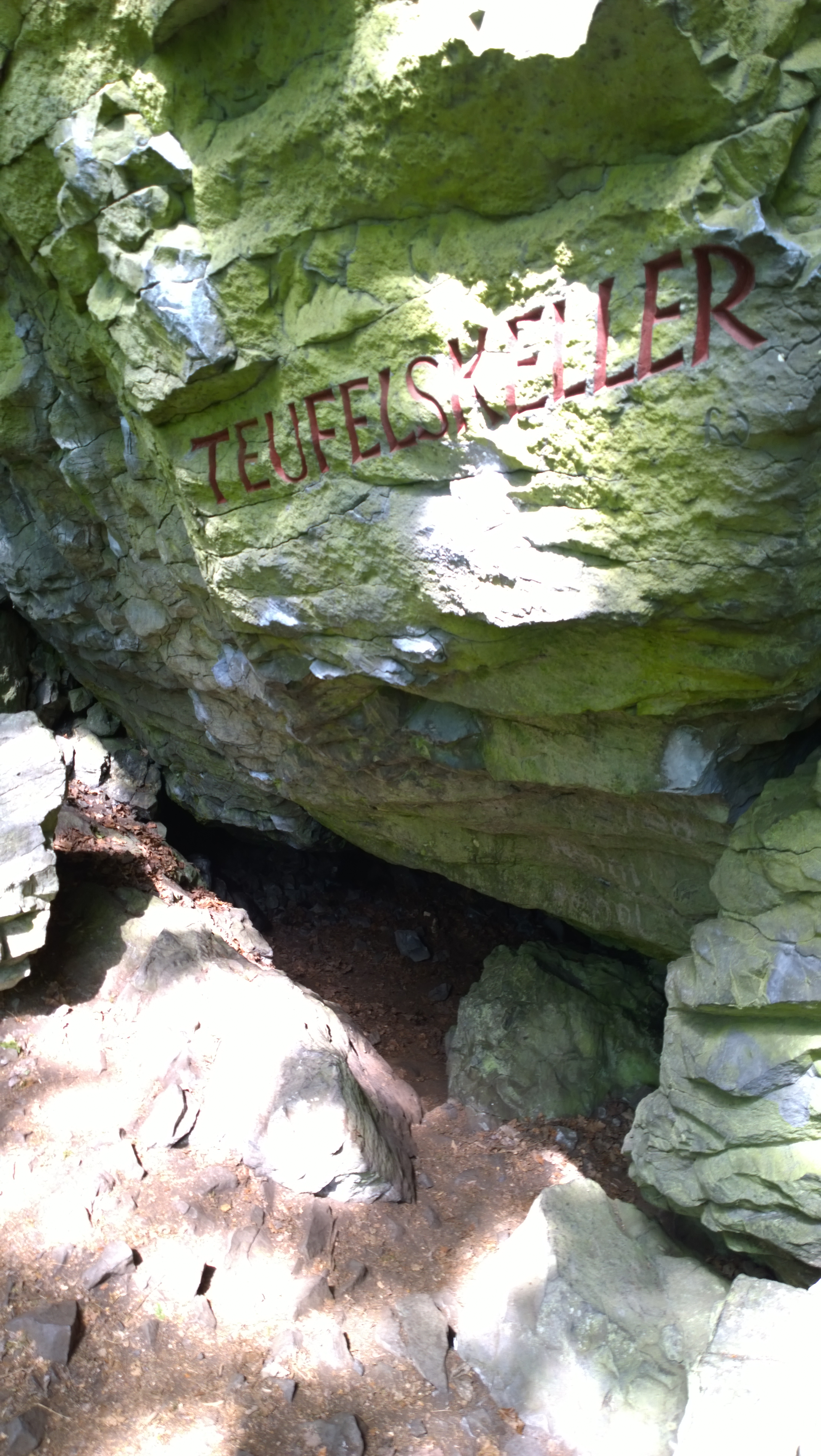 Der Höhleneingang der Teufelskeller Höhle am Gangolfsberg (Oberelsbach)